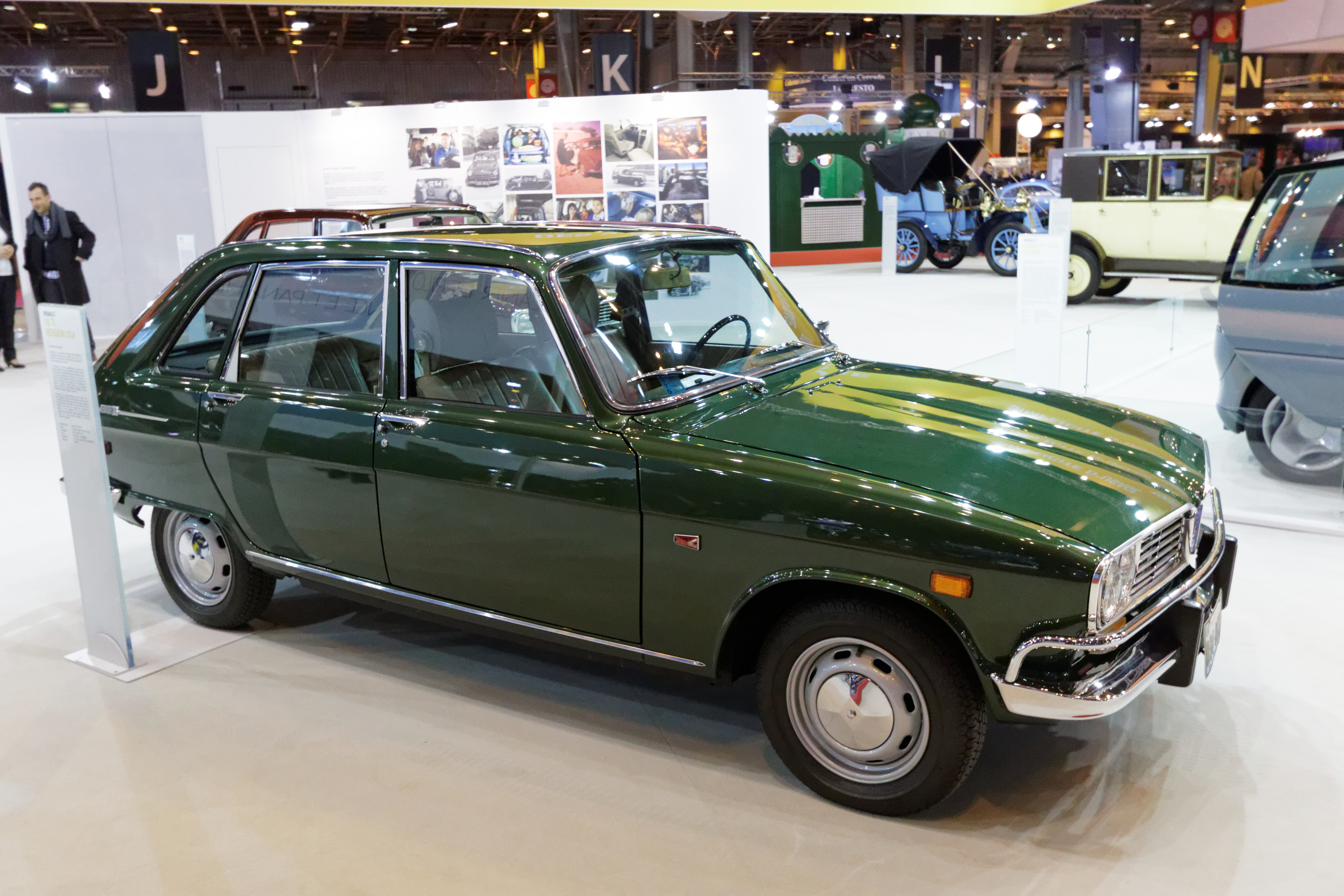 Une des voiture présentée lors du salon Rétromobile de Paris 2015